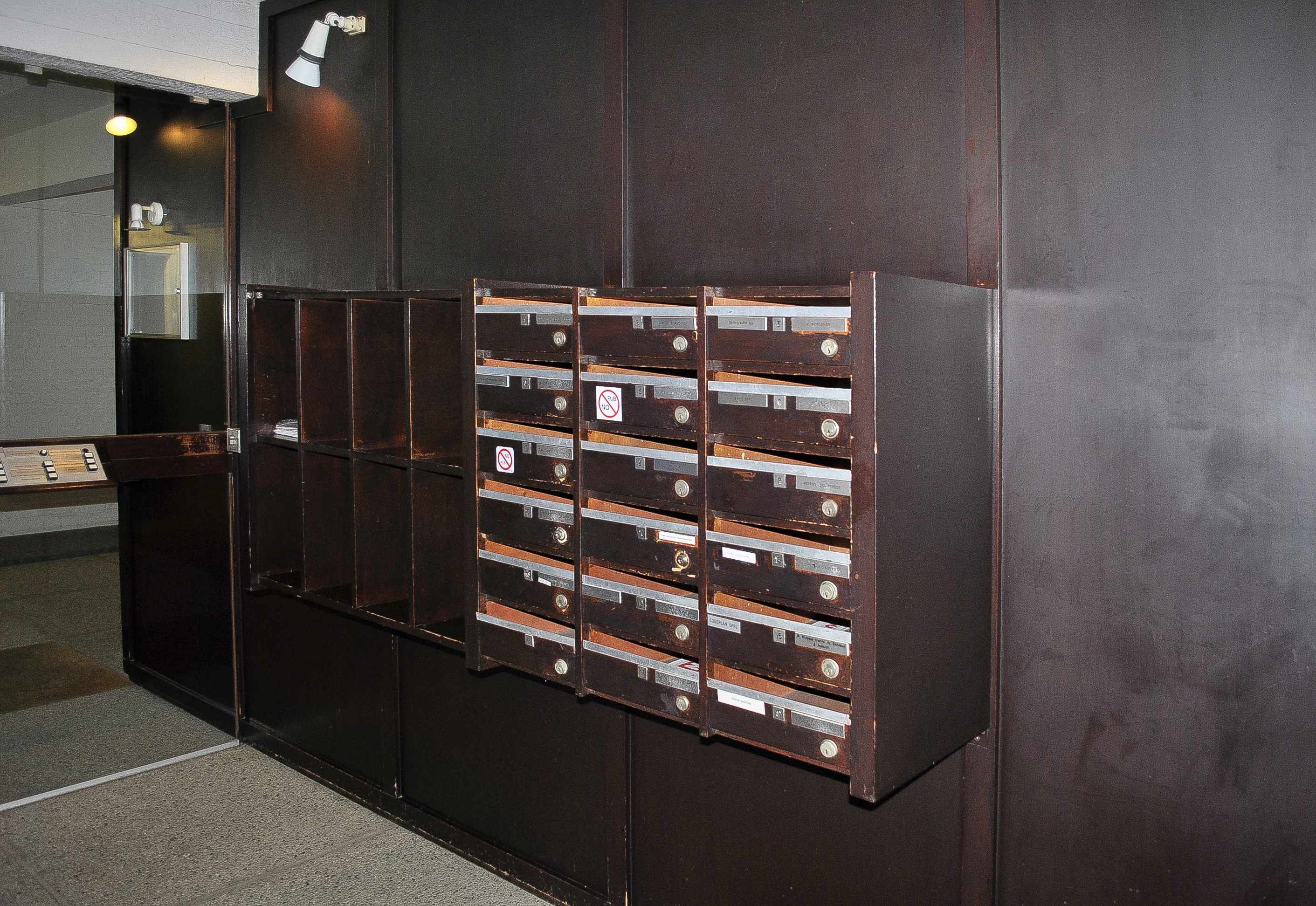 Les boites aux lettres déssinées par les architectes